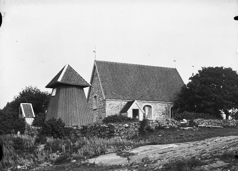 Kyrkan och klockstapeln från sydväst.